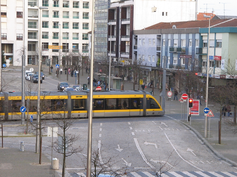 Forum Maia